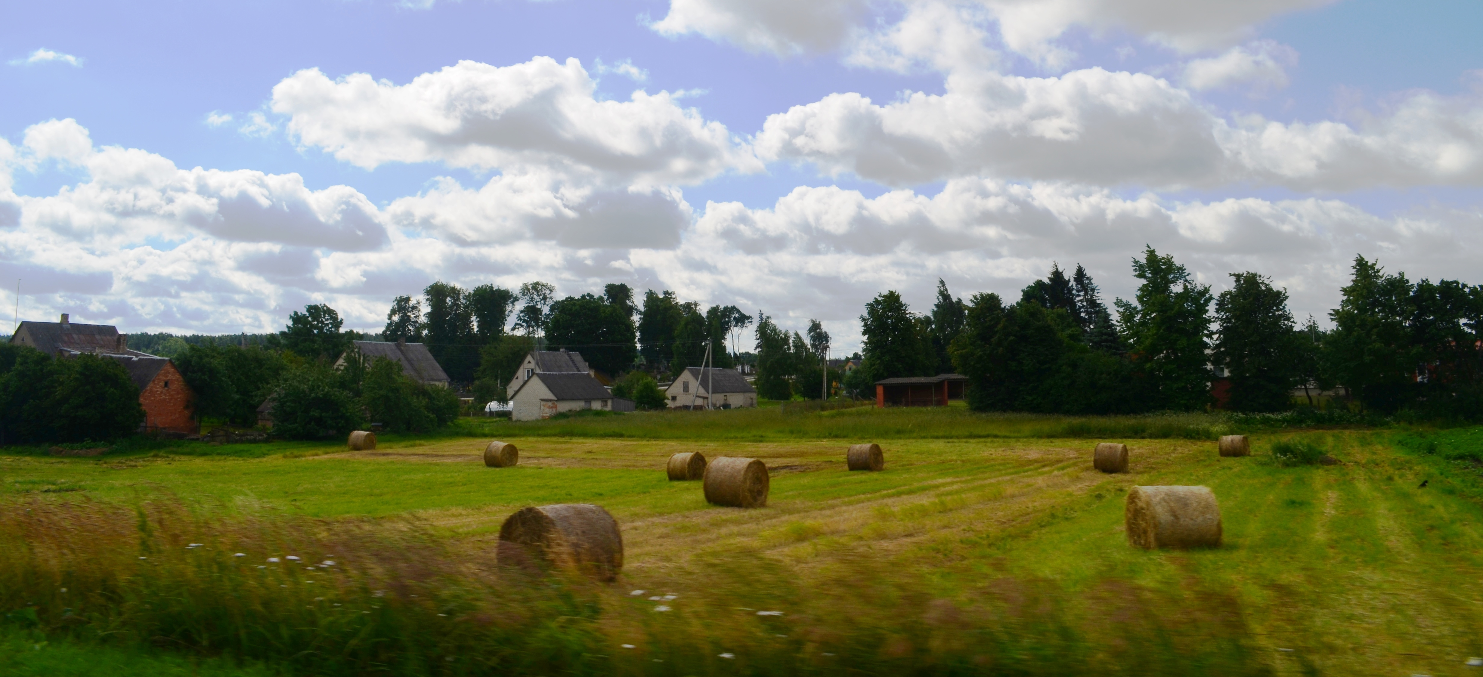 Alytaus gatvė, Krosna, Lazdijų raj.